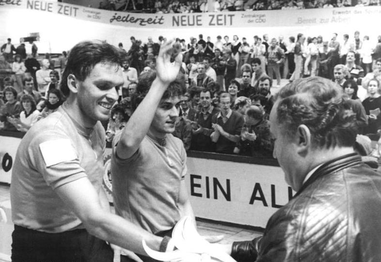 Olaf Ludwig, Manfred Hönel ADN-ZB Settnik 10.12.87 Berlin: Winterbahn - Beifall für die Sieger der Sechs Tage um den Preis Junge Welt. Im abschließenden 500-Runden-Rennen am 9.12.87 erreichten die Gerser Wiemut-Fahrer Olaf Ludwig (links) und Andreas Wartenberg dendritten Rang und holten sich damit den Gesamtsieg nach den sechs Renntagen. Die verdiente Ehrung nahm Manfred Hönel (r.), Sportredakteur der jungen Welt, vor.